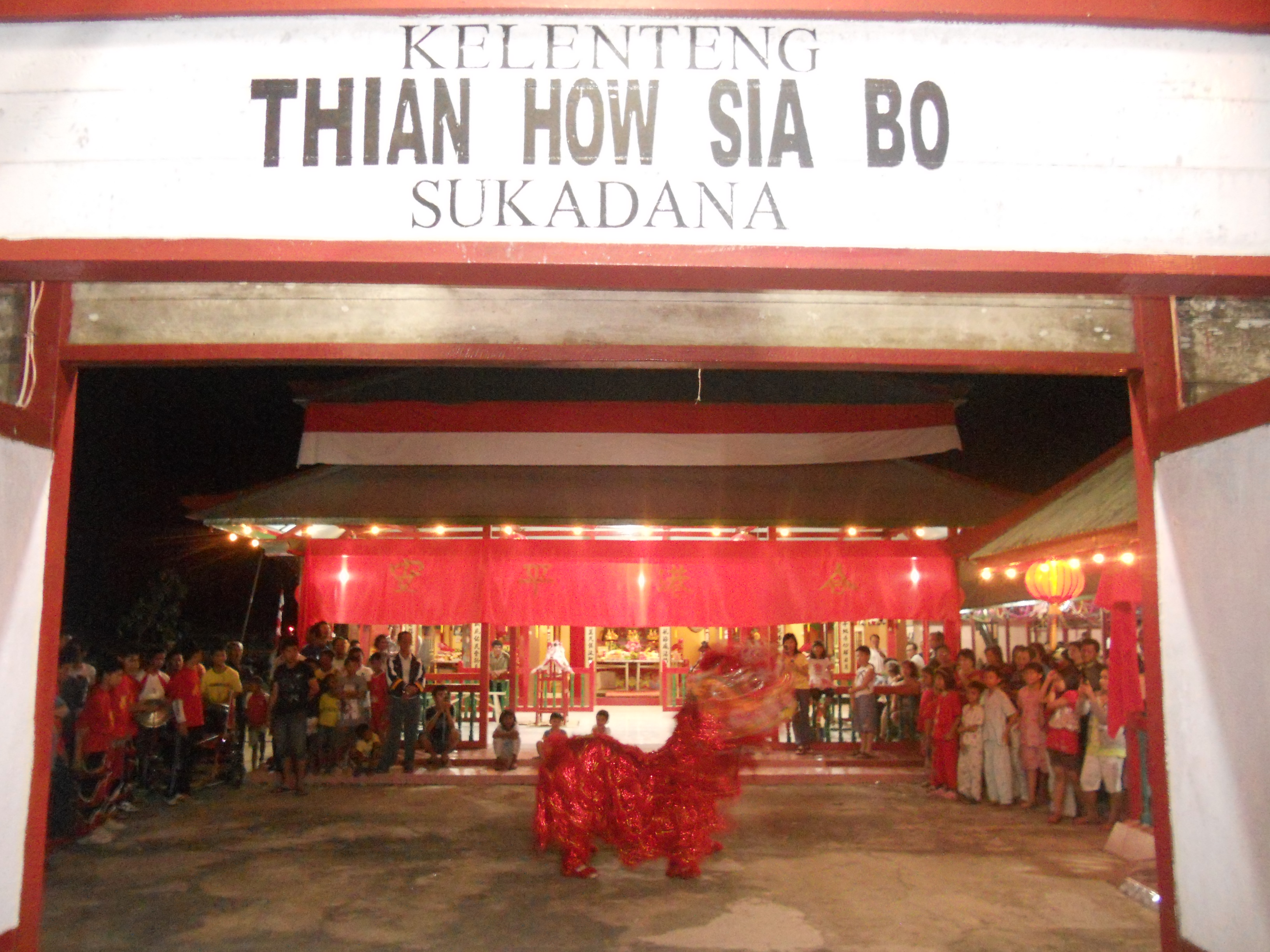 Kelenteng Thian How Sia Bo di Sukadana merayakan ultah ke-29. Terdapat atraksi barongsai dan musik tradisional Tionghua.